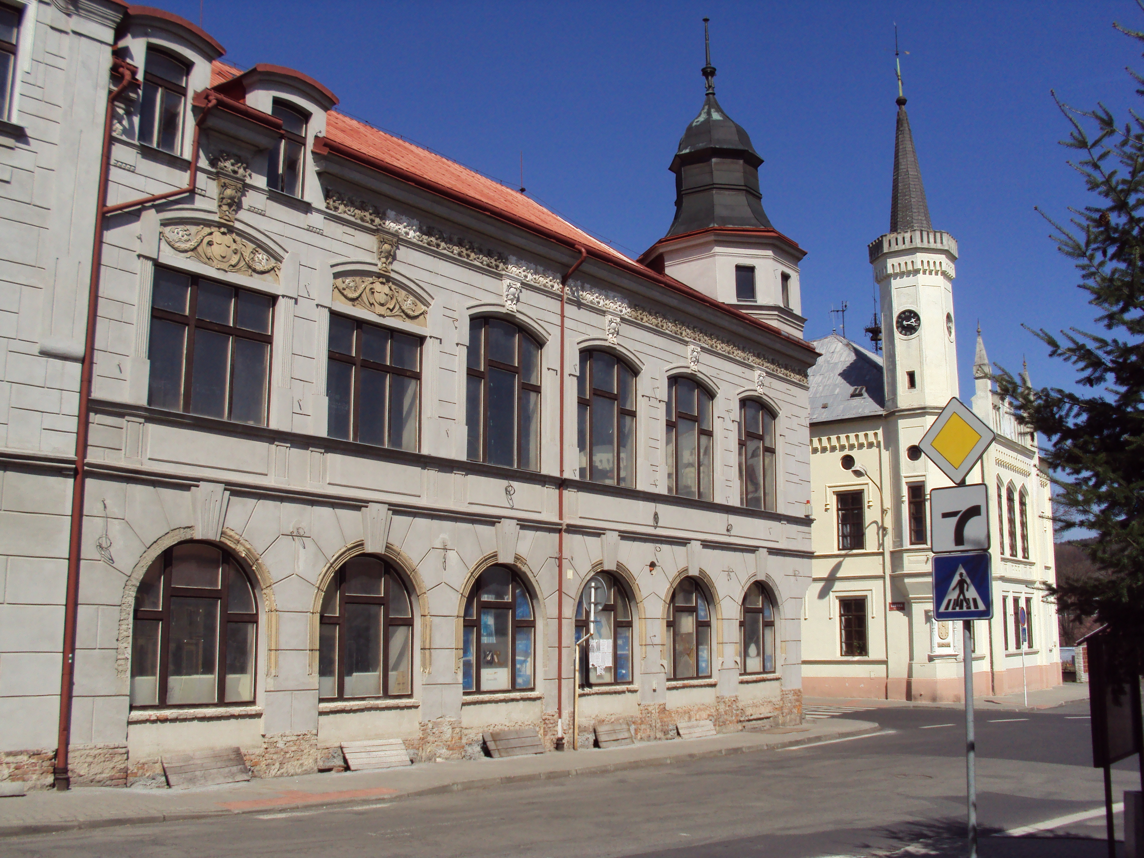 Bývalý hotel Orlík na náměstí v Zákupech